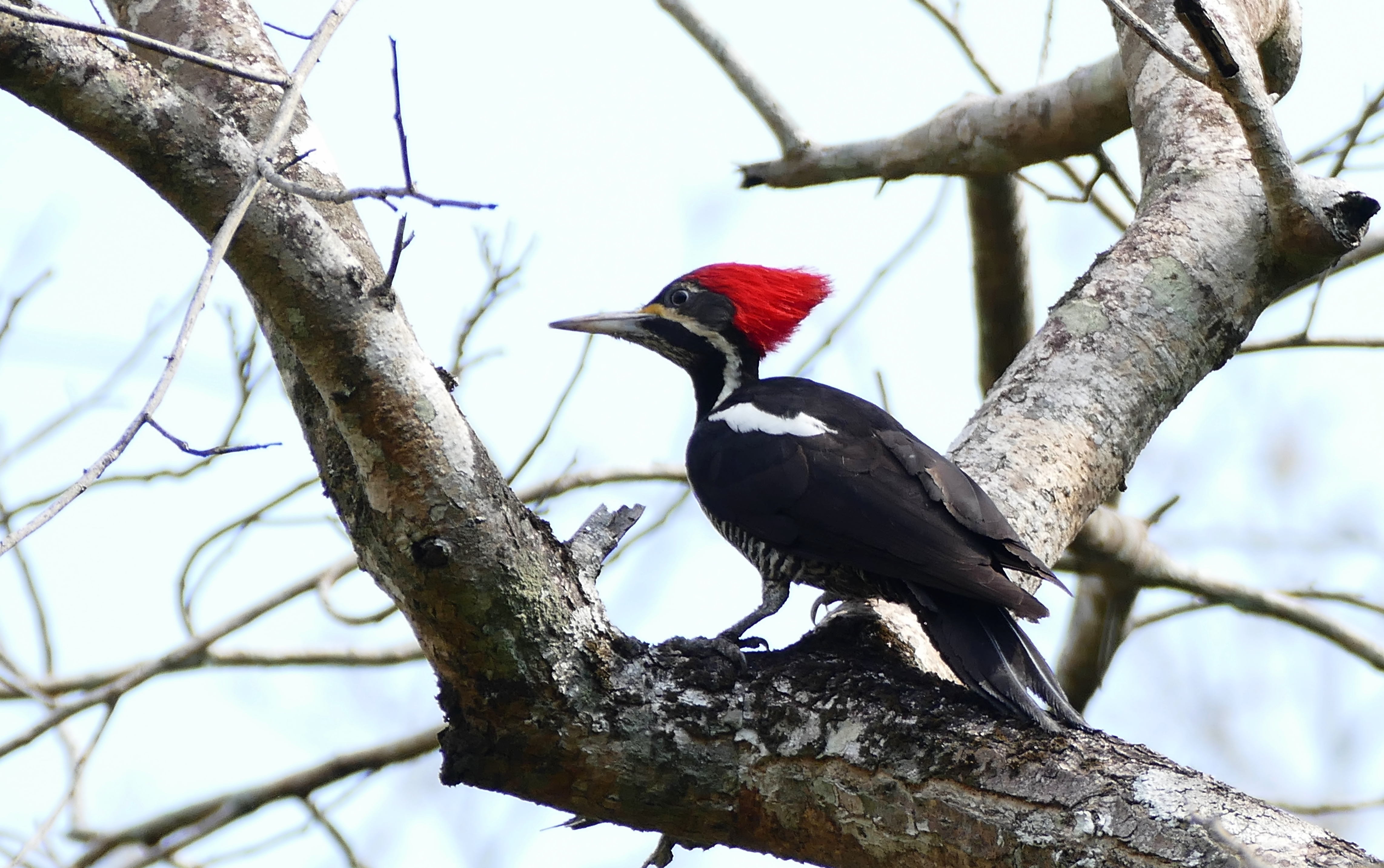 Pousada Rio Claro, Transpantaneira, Poconé, Mato Grosso, BRAZIL